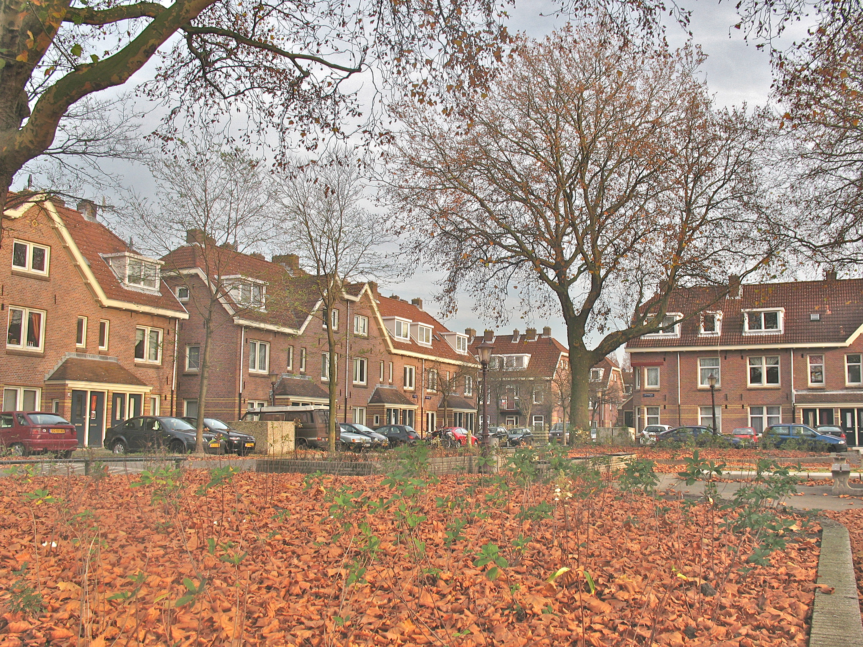 Woningen in de polder Buiksloterham, Amsterdam-Noord. Van der Pekbuurt, Lupineplein.